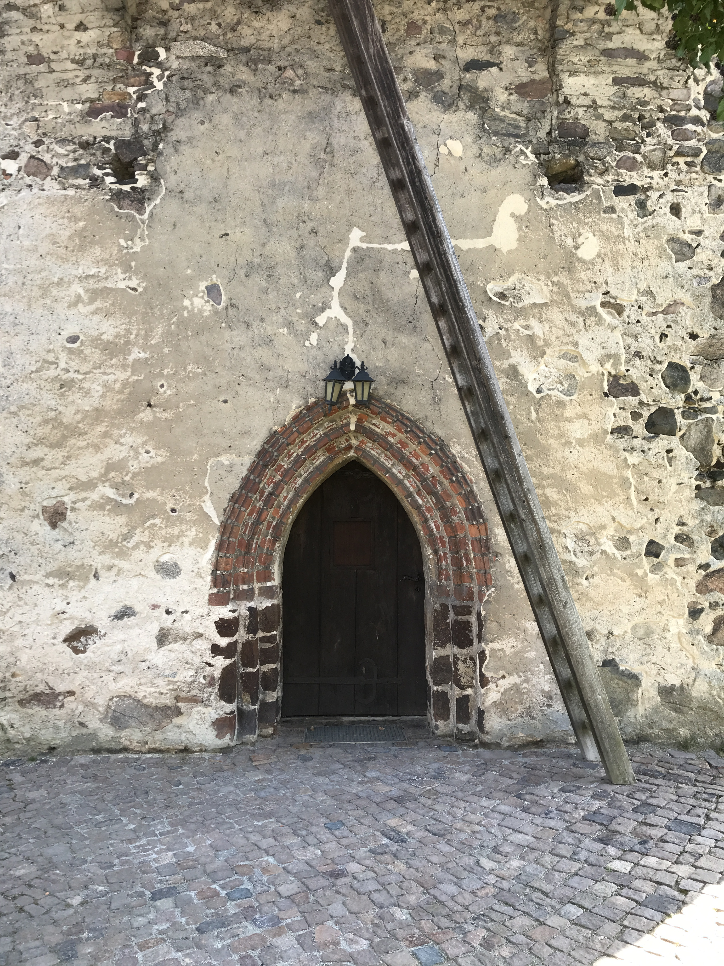 Die Dorfkirche Walddrehna ist eine mittelalterliche Feldsteinkirche, dessen Baugeschichte unter Experten umstritten ist.